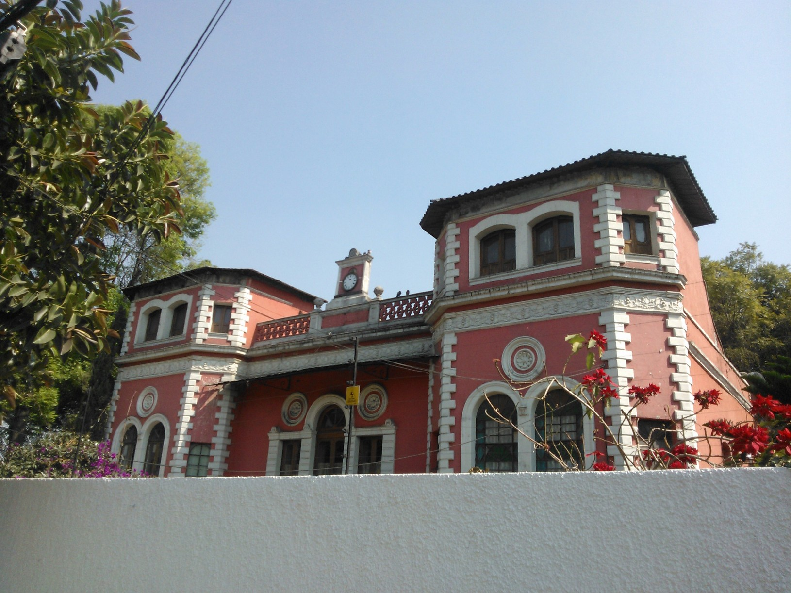 Quinta Pachuca en el barrio de Zapotla, pueblo de Iztacalco